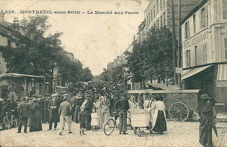 Le Marché aux Puces de Montreuil-sous-Bois